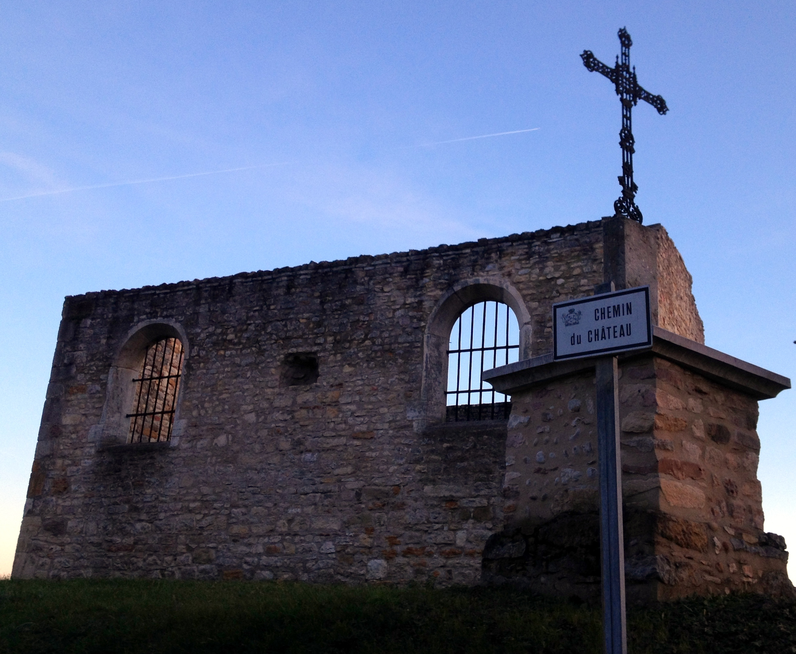 Chapelle (en ruines) de Saint-Didier-de-Formans.